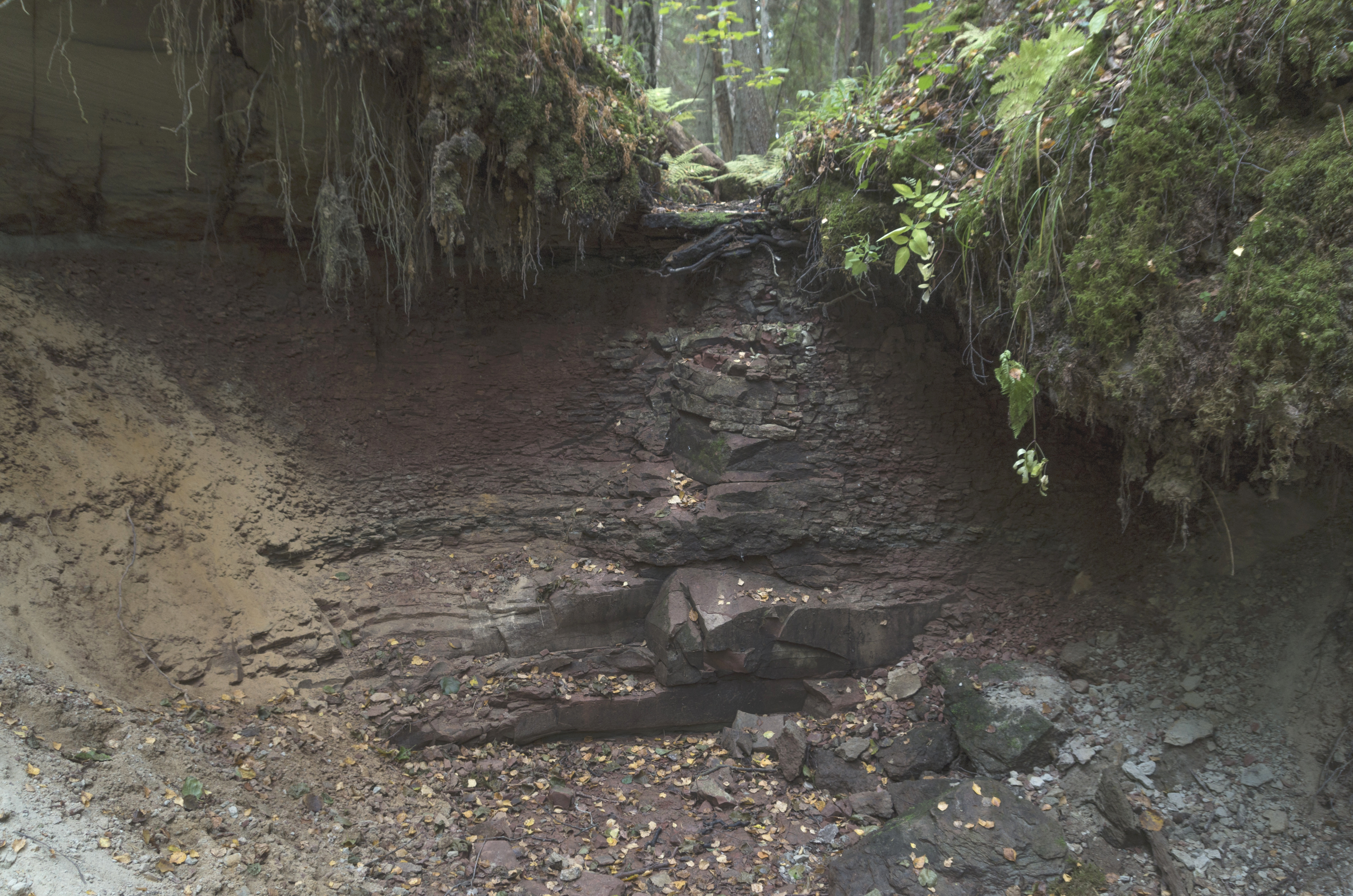 Zartapu grava